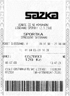 Česky: Upravený scan potvrzení o přijetí sázky hry Sportka, je zde uveden počet slosování, datum slosování, hodnota vkladu, tipovaná čísla, zda se sázející účastní hry Šance a informace o sběrně. Každé potvrzení má na sobě ochranné prvky a jeho barva je oranžová.